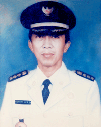 Wali Kota Parepare 1998–2003, Basrah Hafid